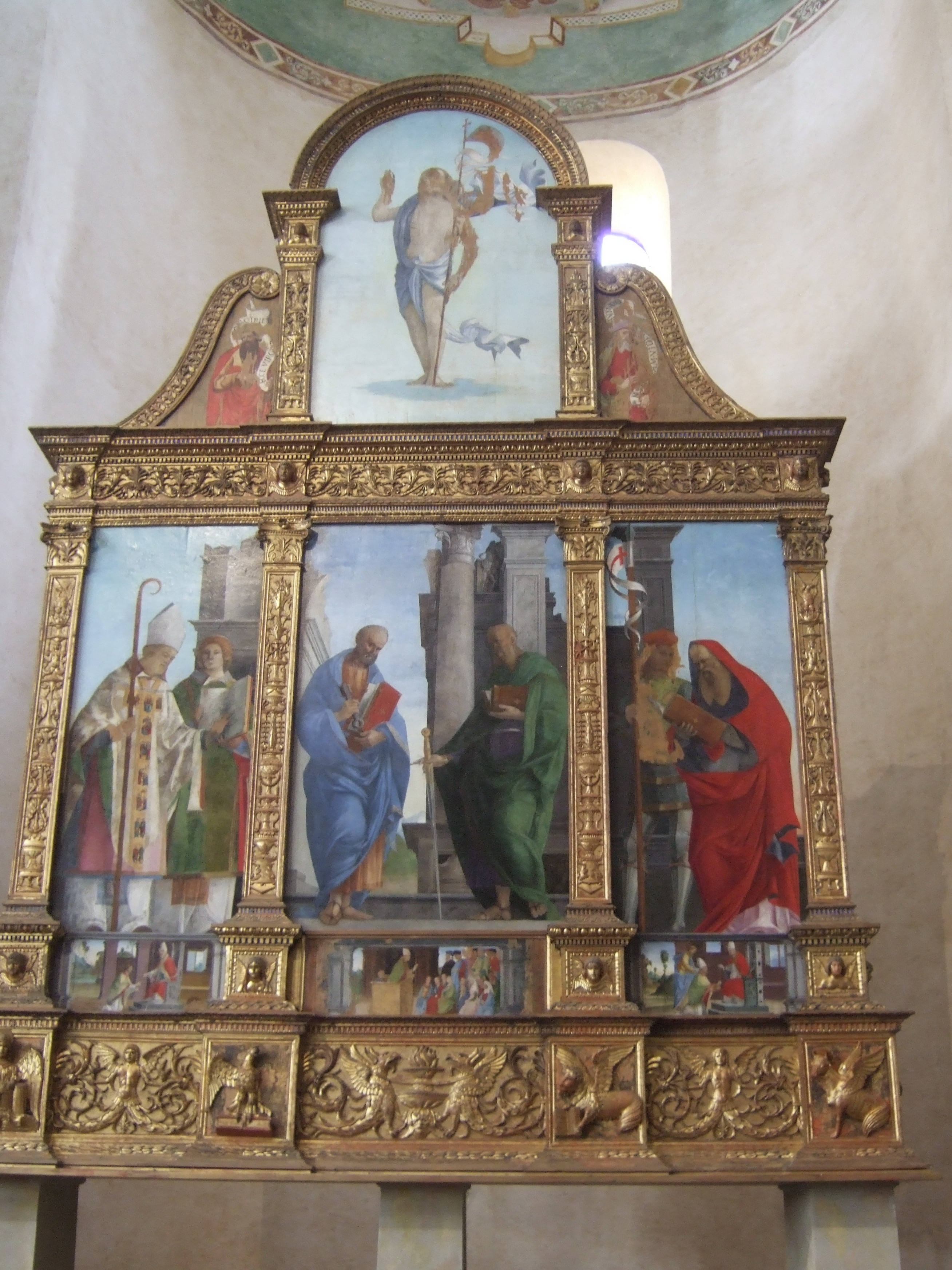 Basilica di Aquileia - Pellegrino da San Daniele - Polittico raffigurante i santi Ermacora e Fortunato, Pietro e Paolo, Giorgio e Girolamo